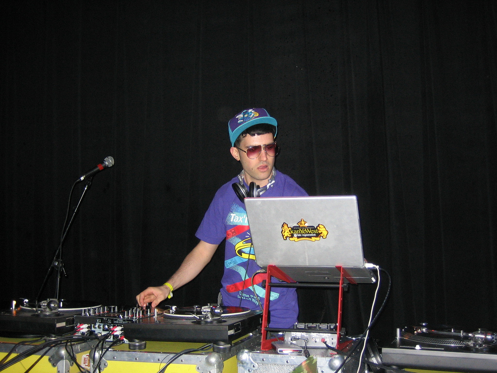 DJ A-Trak